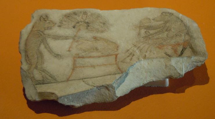 Bildostrakon